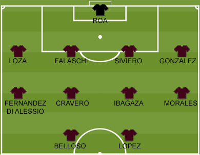 LanusConmebol997.jpg